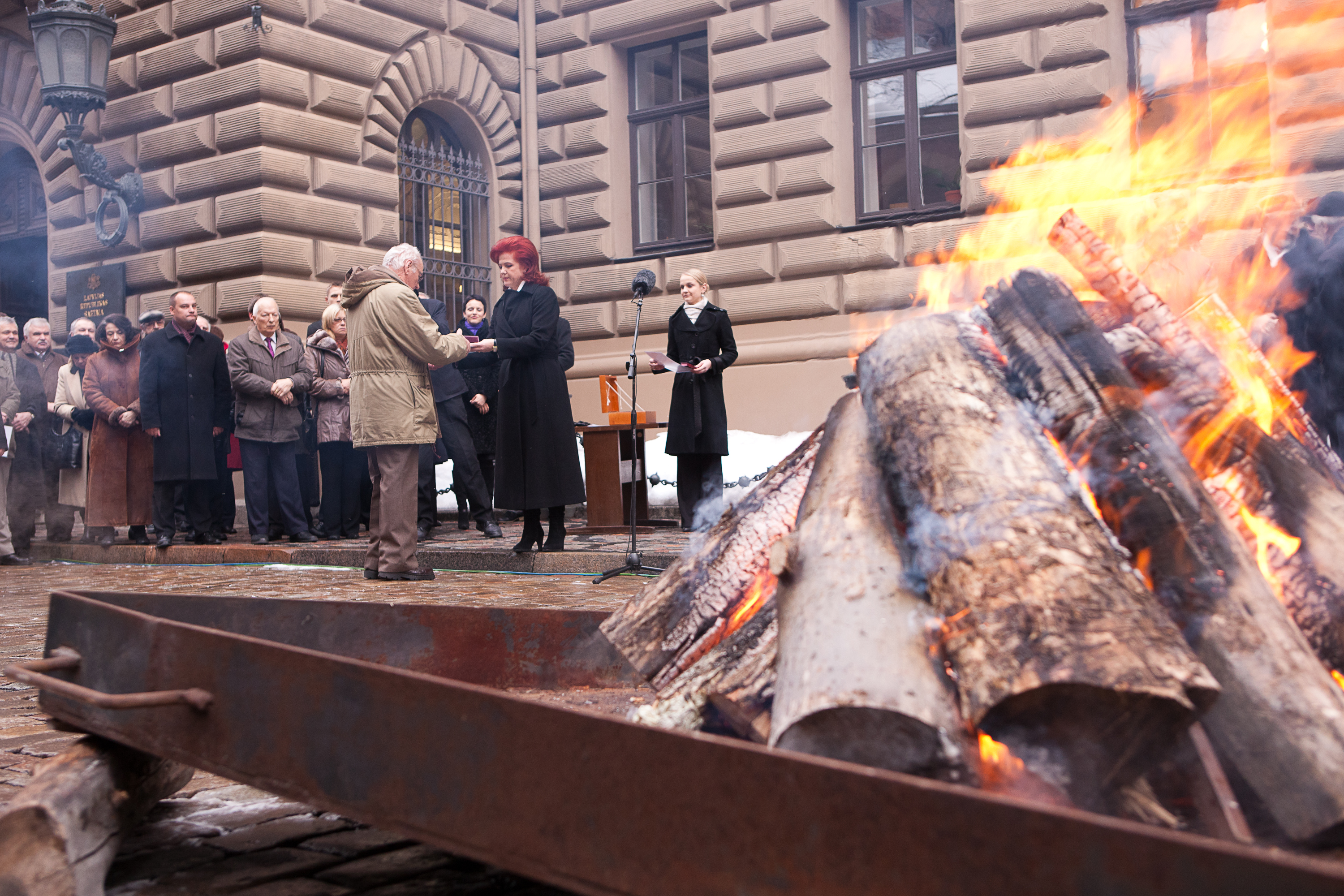 2011.gada 20.janvāris. Saeimas priekšsēdētāja Solvita Āboltiņa pie Saeimas nama pasniedz piemiņas zīmes 1991.gada barikāžu dalībniekiem. Foto: Saeima